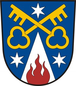 Šimanov